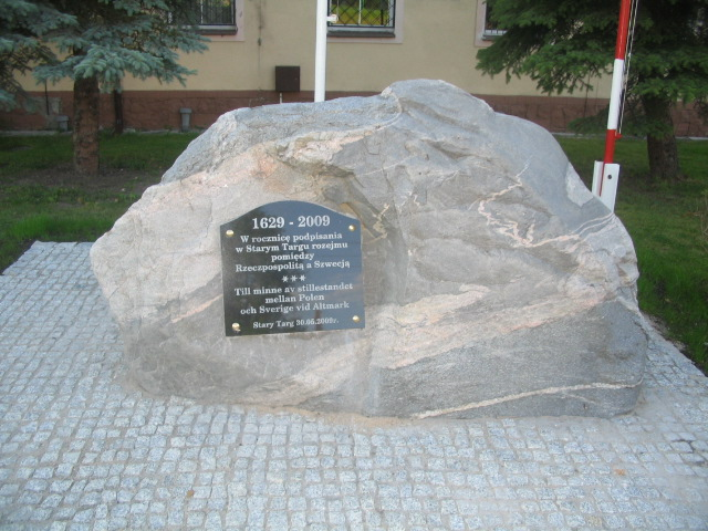 Pomnik upamiętniający rozejm polsko-szwedzki w 1629